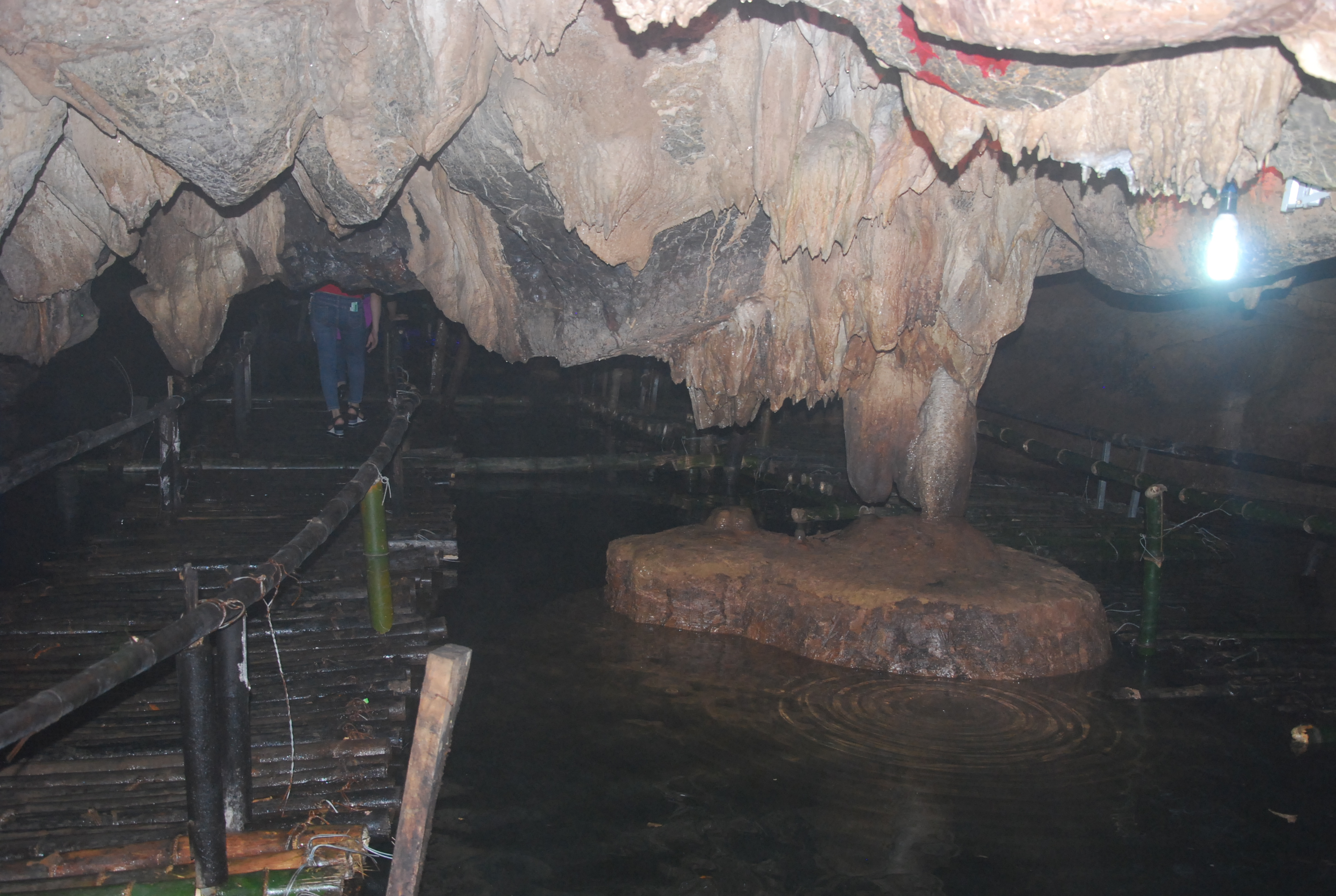 Động Tiên Cá thuộc Thung Nham trong Quần thể di sản thế giới Tràng An